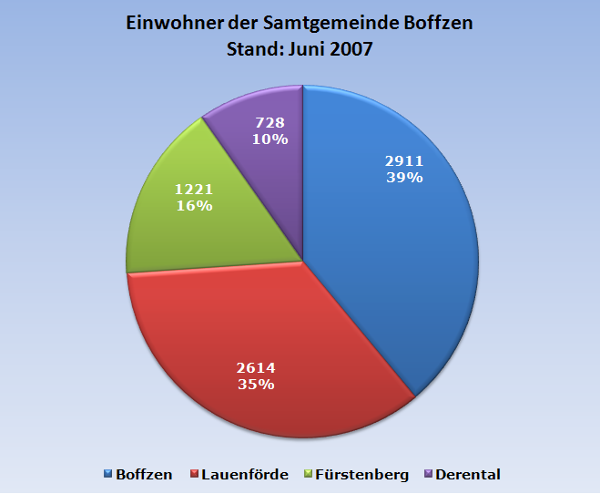 Bevölkerungstatistik: Einwohnerstand der Mitgliedsgemeinden der Samtgemeinde Boffzen (Landkreis Holzminden) zum 30. Juni 2007 nach Datenstand des Niedersächsischen Landesamtes für Statistik (NLS).